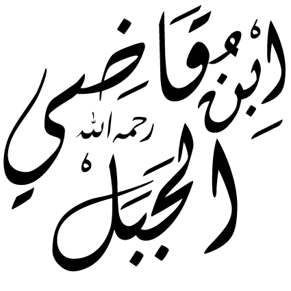 اسم ابن شيخ الجبل مع الترحم عليه